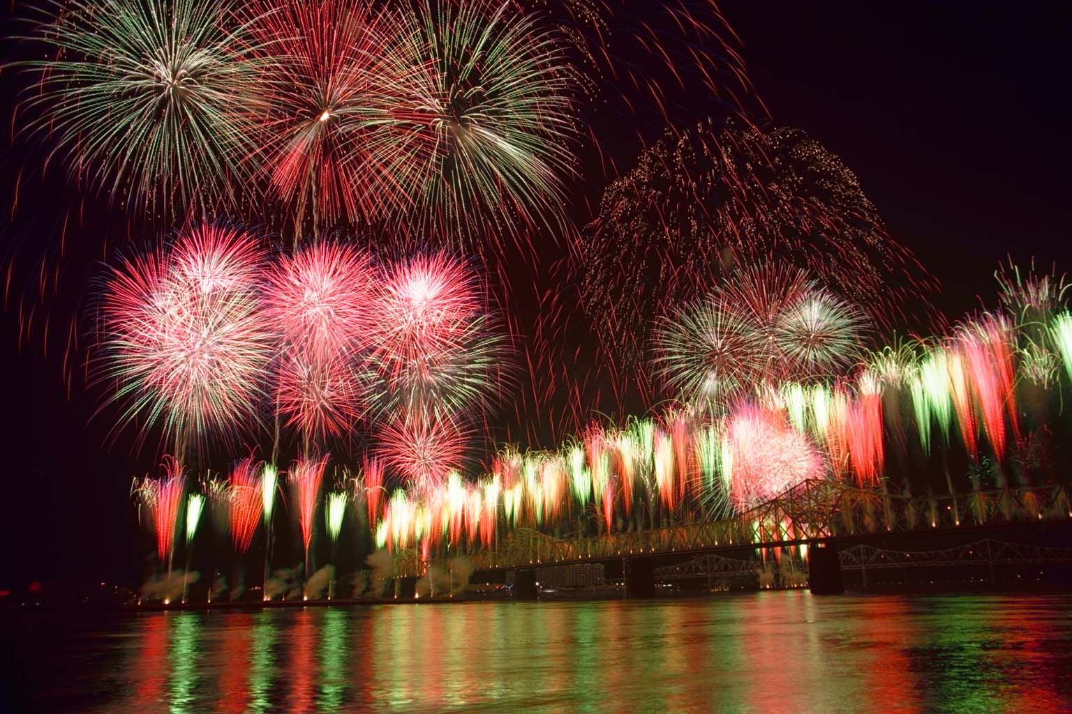 Louisville, Kentucky, Thunder over Louisville